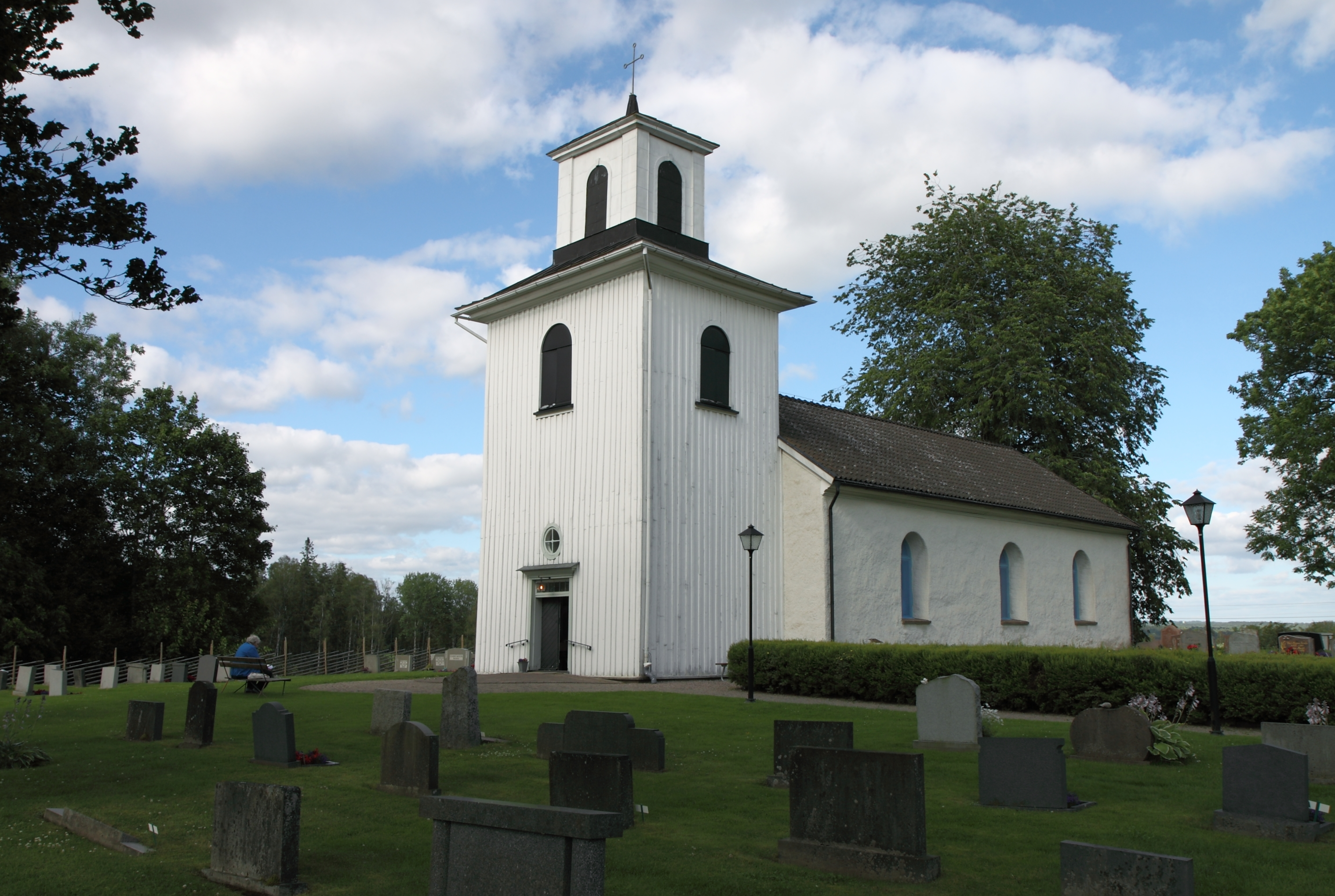 Finnekumla kyrka.